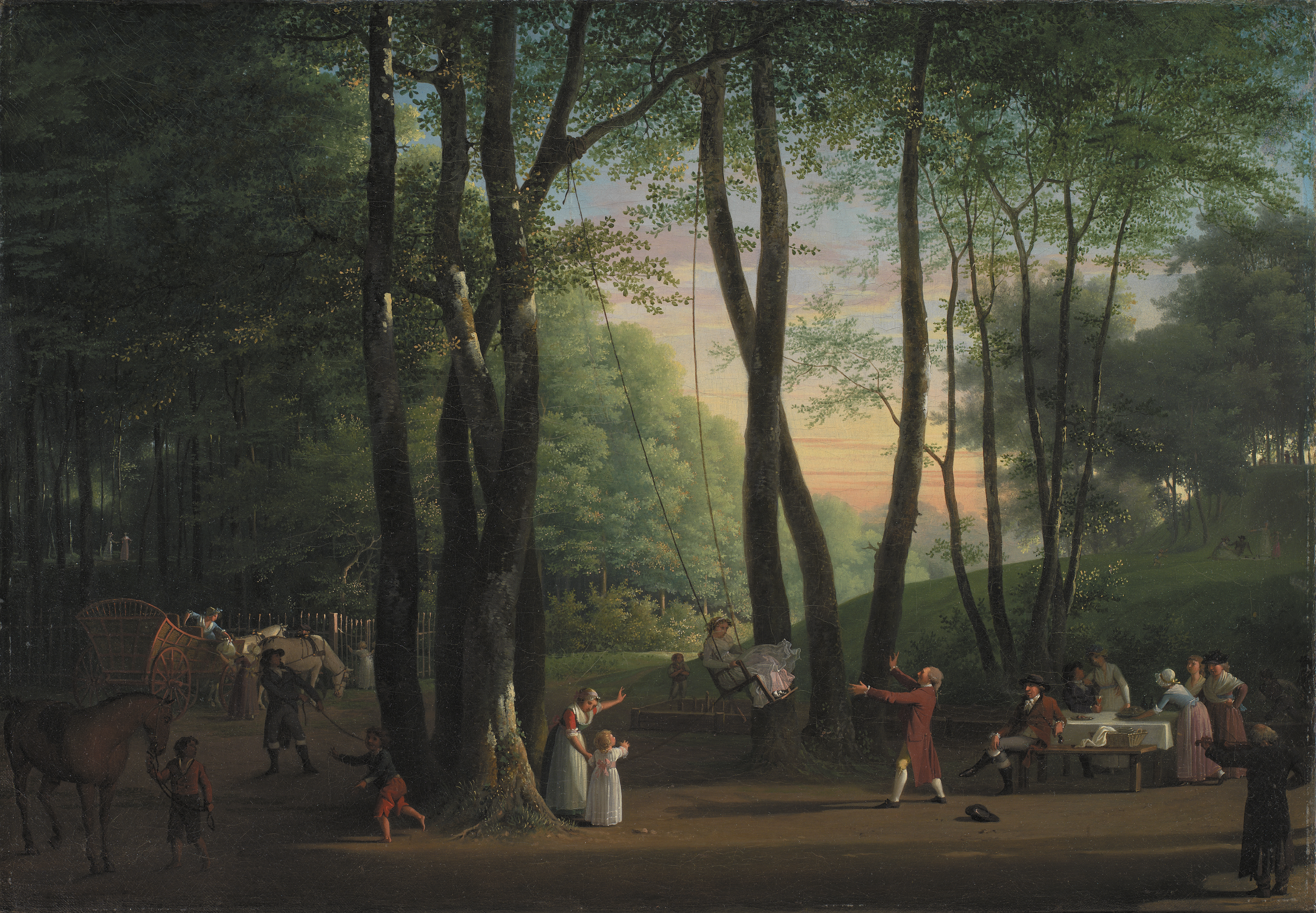 Depicted place: Dansebakken (55°46′42″N 12°29′36″E / 55.778202°N 12.493322°E)